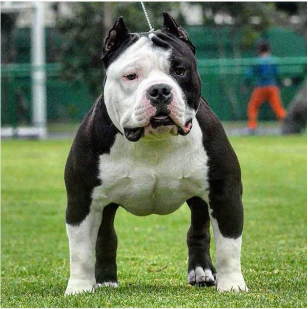 L38 Powbah, Bully Pocket.